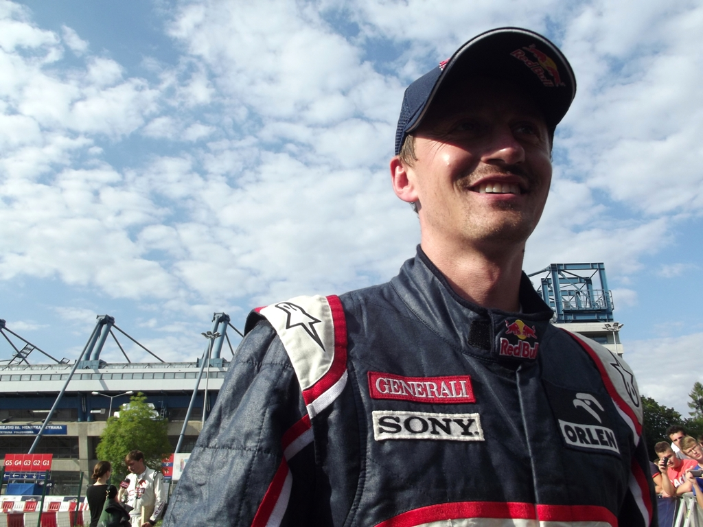 Zdjęcie zrobione podczas ogólnopolskiego finału zawodów Red Bull Kart Fight 2013 w Krakowie.